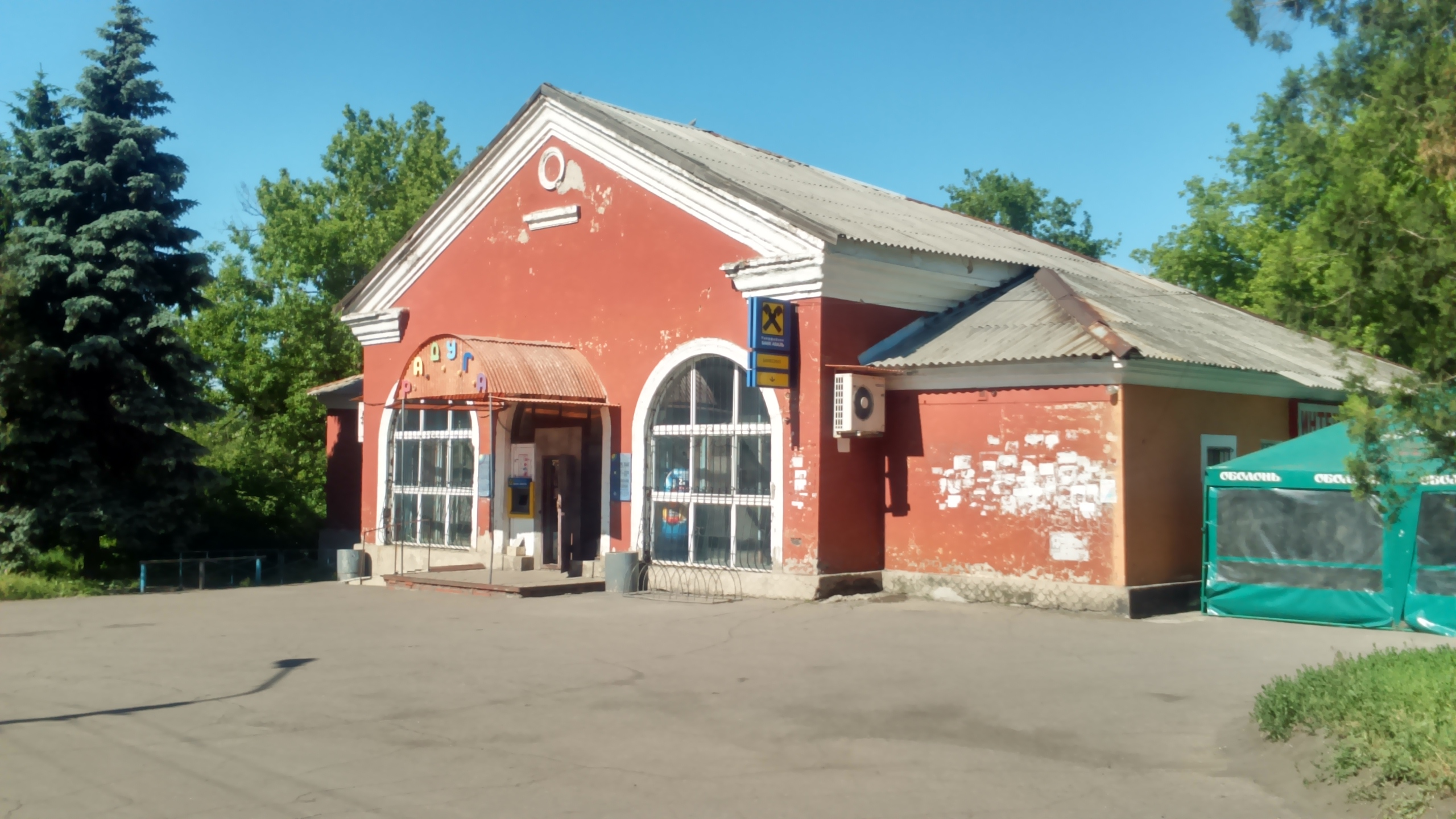 Водя́нське — селище міського типу Донецької області, підпорядковане Білицькому, розташоване на річці Водяна за 93 км від Донецька. Відстань до райцентру становить близько 6 км і проходить автошляхом місцевого значення.